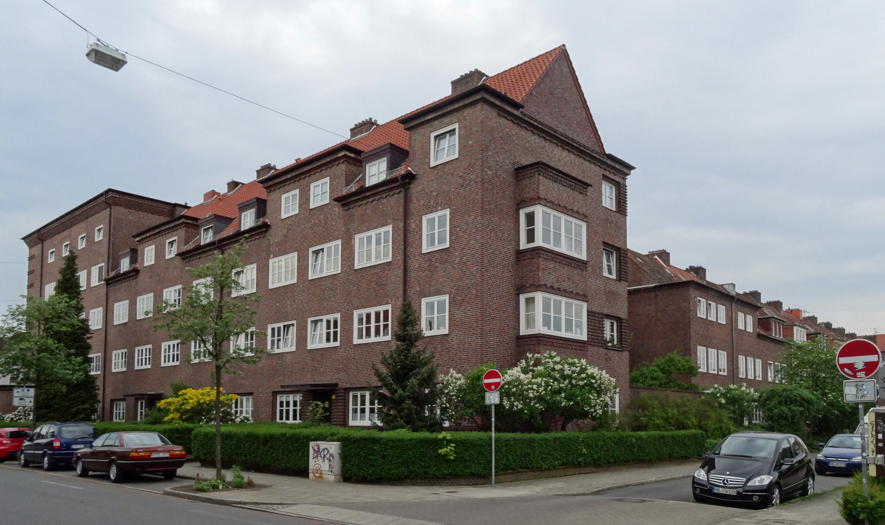 Wohnanlage Hamburger Straße in Bremen, Hamburger Straße 222. Seite: Stader StraßeDie Gesamtanlage ist ein geschütztes Kulturdenkmal in der Freien Hansestadt Bremen, mit der Nr. 0472 beim Landesamt für Denkmalpflege registriert.